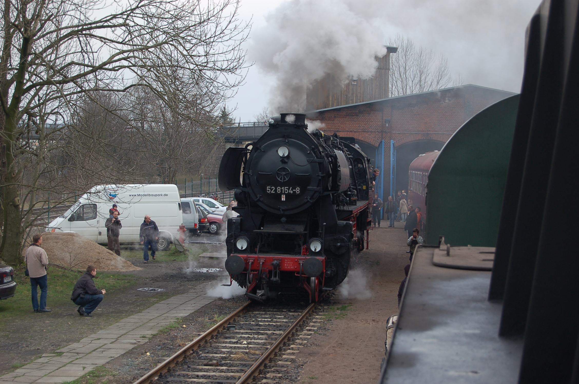 Dampflok 52 8154-8 des Eisenbahnmuseums Bayerischer Bahnhof zu Leipzig e.V. (EMBB).